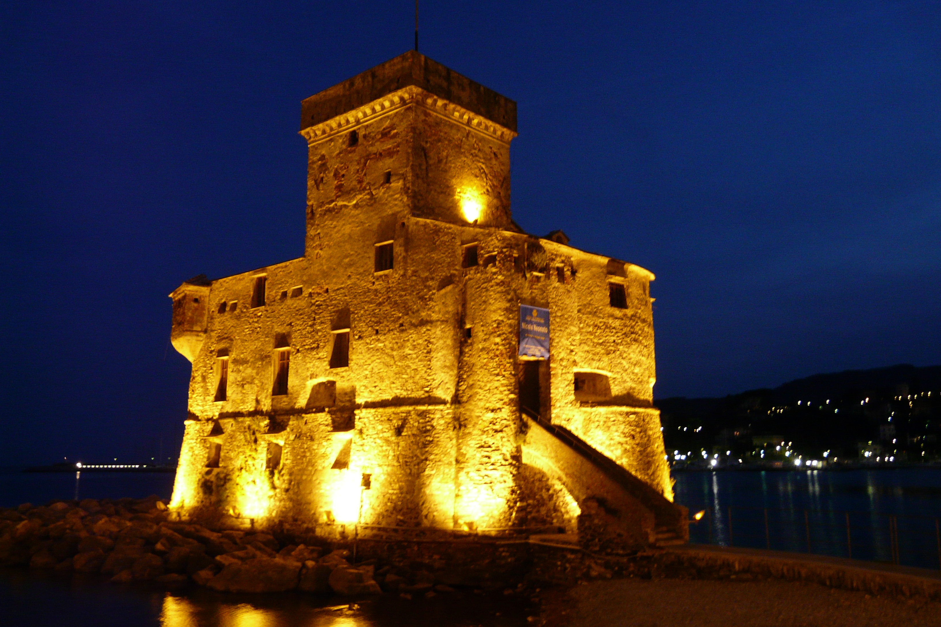 Castello di Rapallo, Liguria, Italia